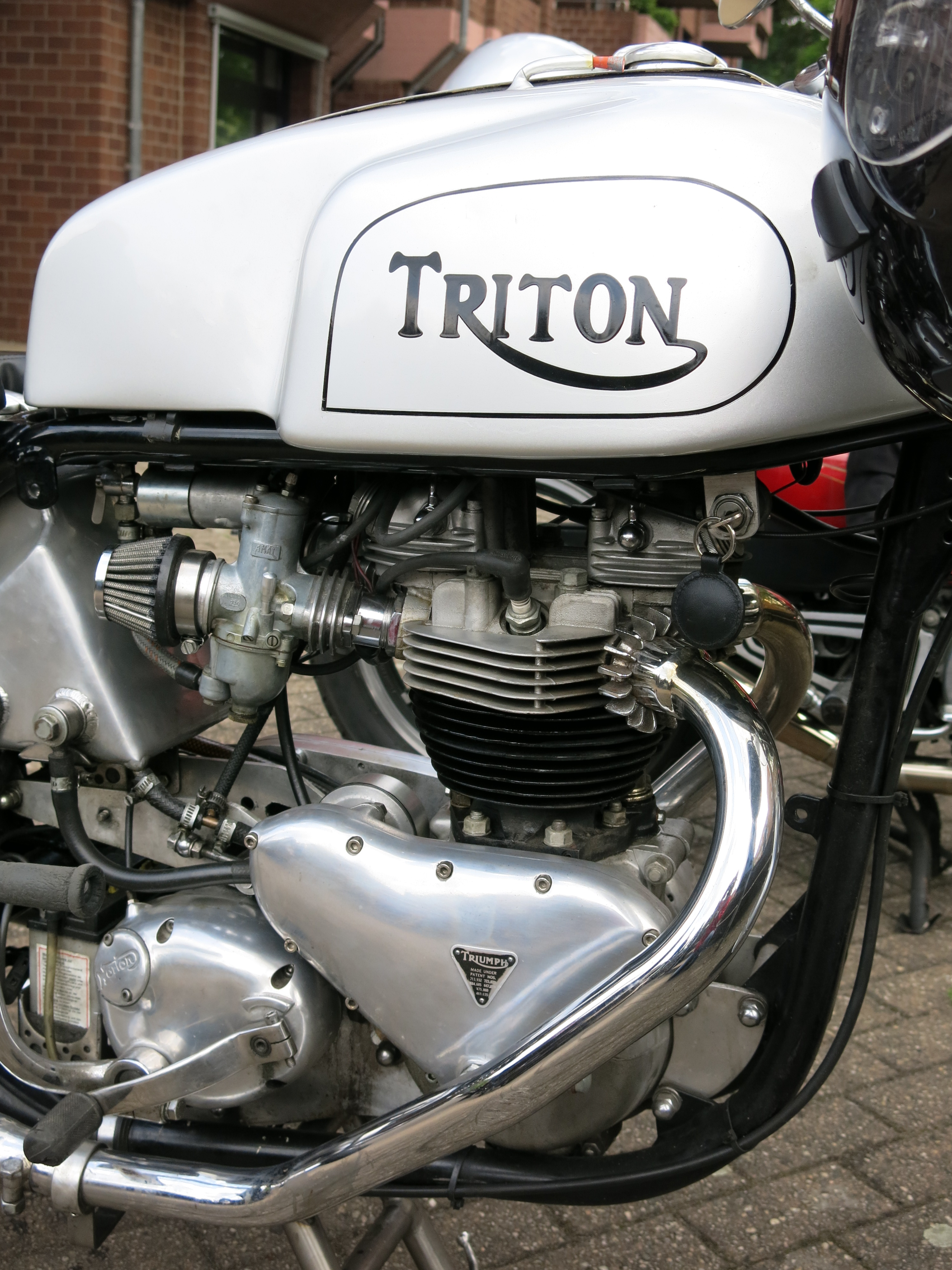 Triton, Motor der Triumph, Federbett-Rahmen der Norton; Baujahr unbekannt